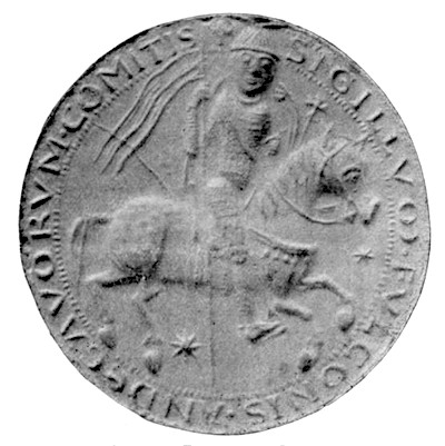 Sceau de Foulques le Jeune